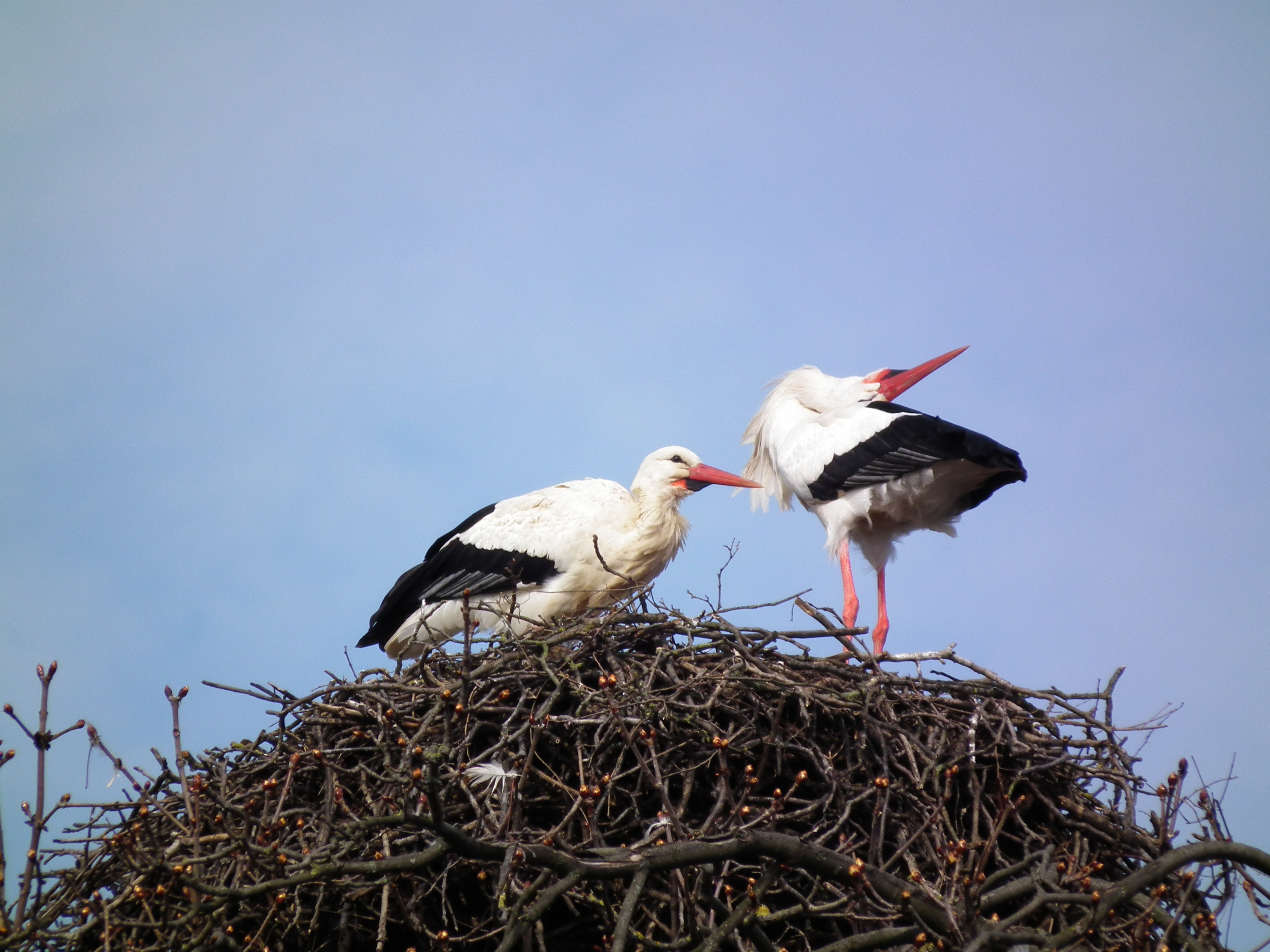 Weißstorch (Ciconia ciconia) in Nordbaden (Deutschland)